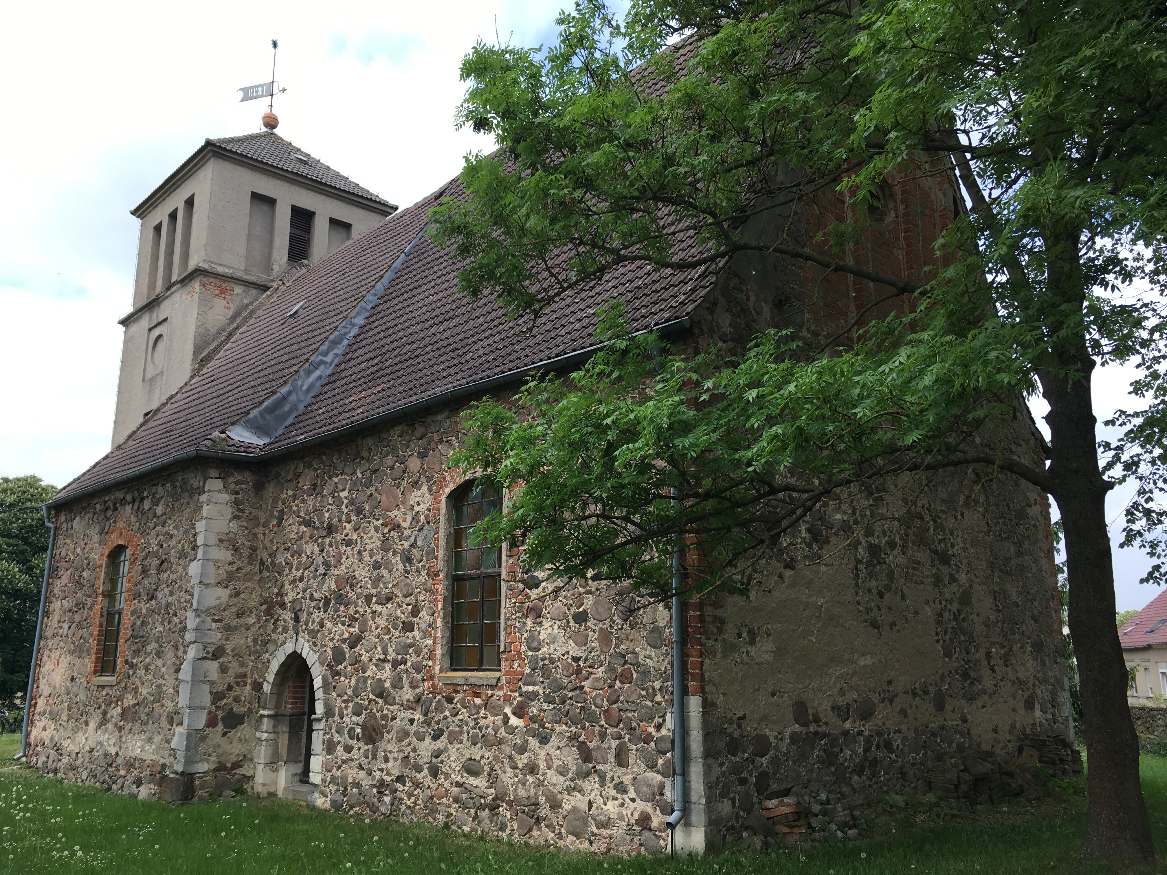 Die Dorfkirche Eggersdorf (Müncheberg) ist ein spätmittelalterlicher Bau aus Feld- und Backsteinen. Das Kirchenschiff ist auf seiner Westseite verkürzt. Experten vermuten daher, dass ursprünglich eine größere Anlage geplant war. Im Innern befindet sich unter anderem ein Kanzelaltar, den J. C. Martin im Jahr 1746 schuf.